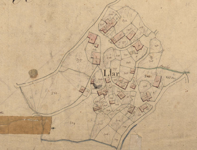 Llar (Canavelles) en el Cadastre napoleònic del 1812 (Arxius Departamentals dels Pirineus Orientals)